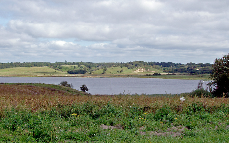 Louns Sø Gislum Herred Aalborg Amt/Nordjyllands Amt, Denmark. Image by me: User Nico-dk / Nils jepsen